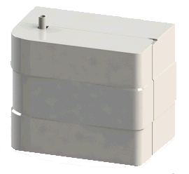 NEZBULISEUR D'AMBIANCE